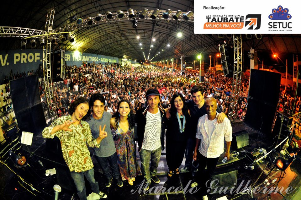 Paranga na Avenida do Povo, em Taubaté. Com participação especial de Zeca Baleiro, Gabriel Guedes e Gabriel Sater.